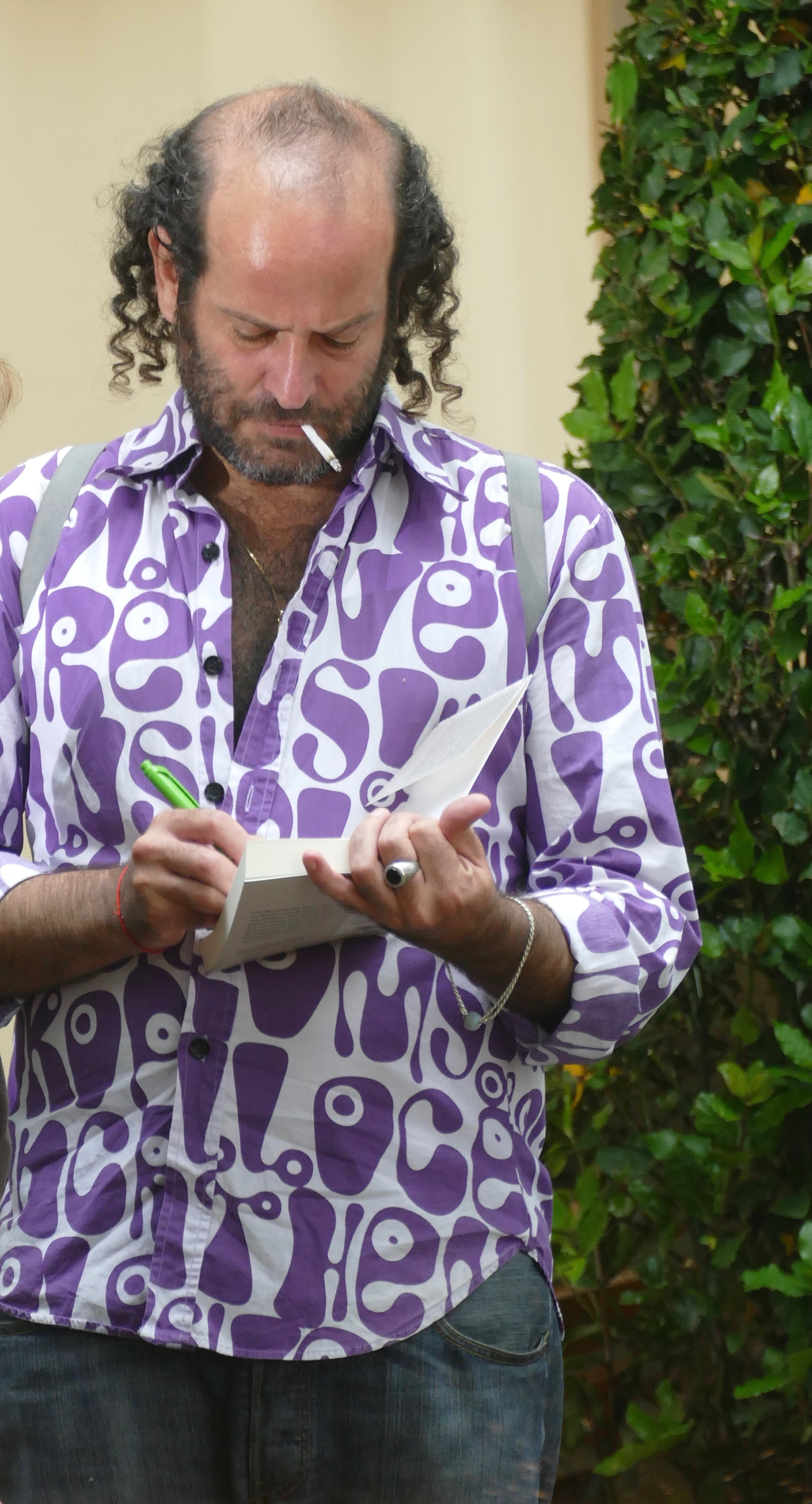 Tomer Gardi signiert ein Buch im ORF-Garten, wo er beim Bachmannpreis 2016 las.